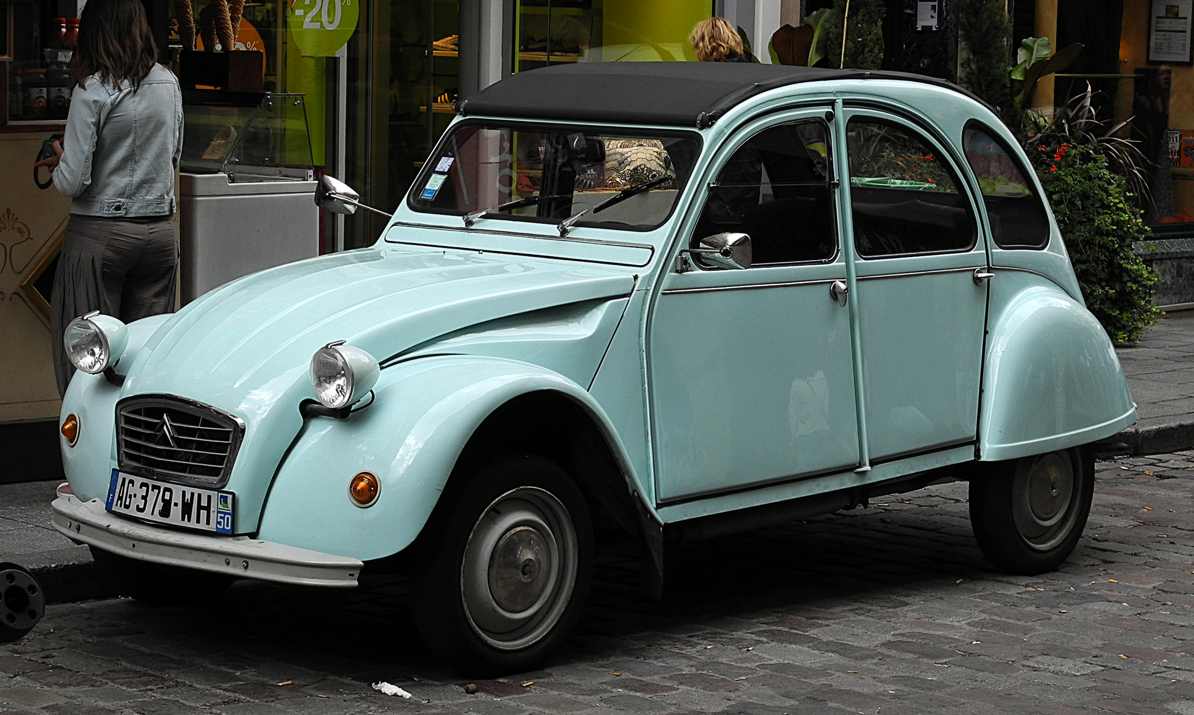 Citroën 2CV6 Spécial